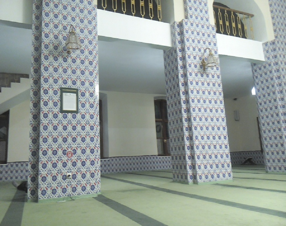 Интерьер Московской исторической мечети